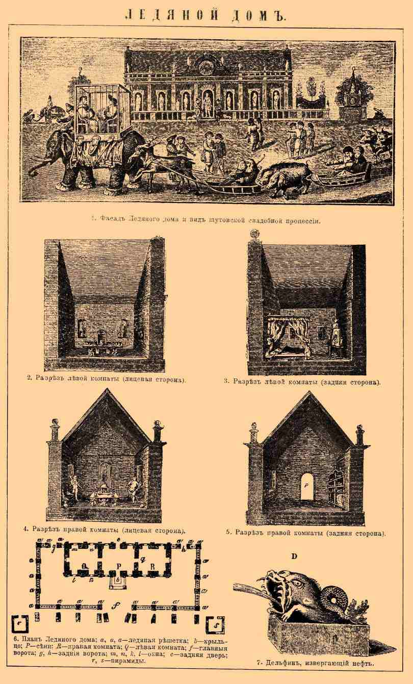 Ледяной дом (схема)